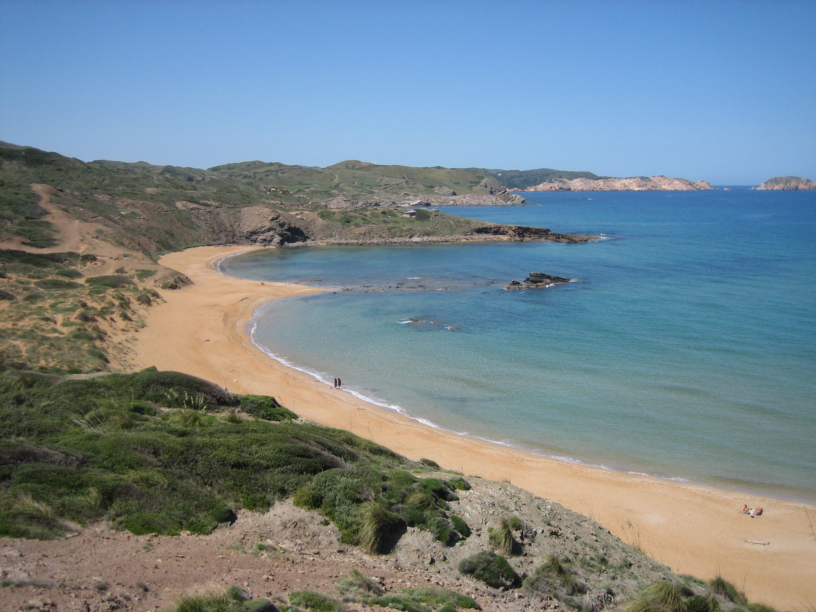 Platja de Cavalleria y Platja de Ferragut (es Mercadal)